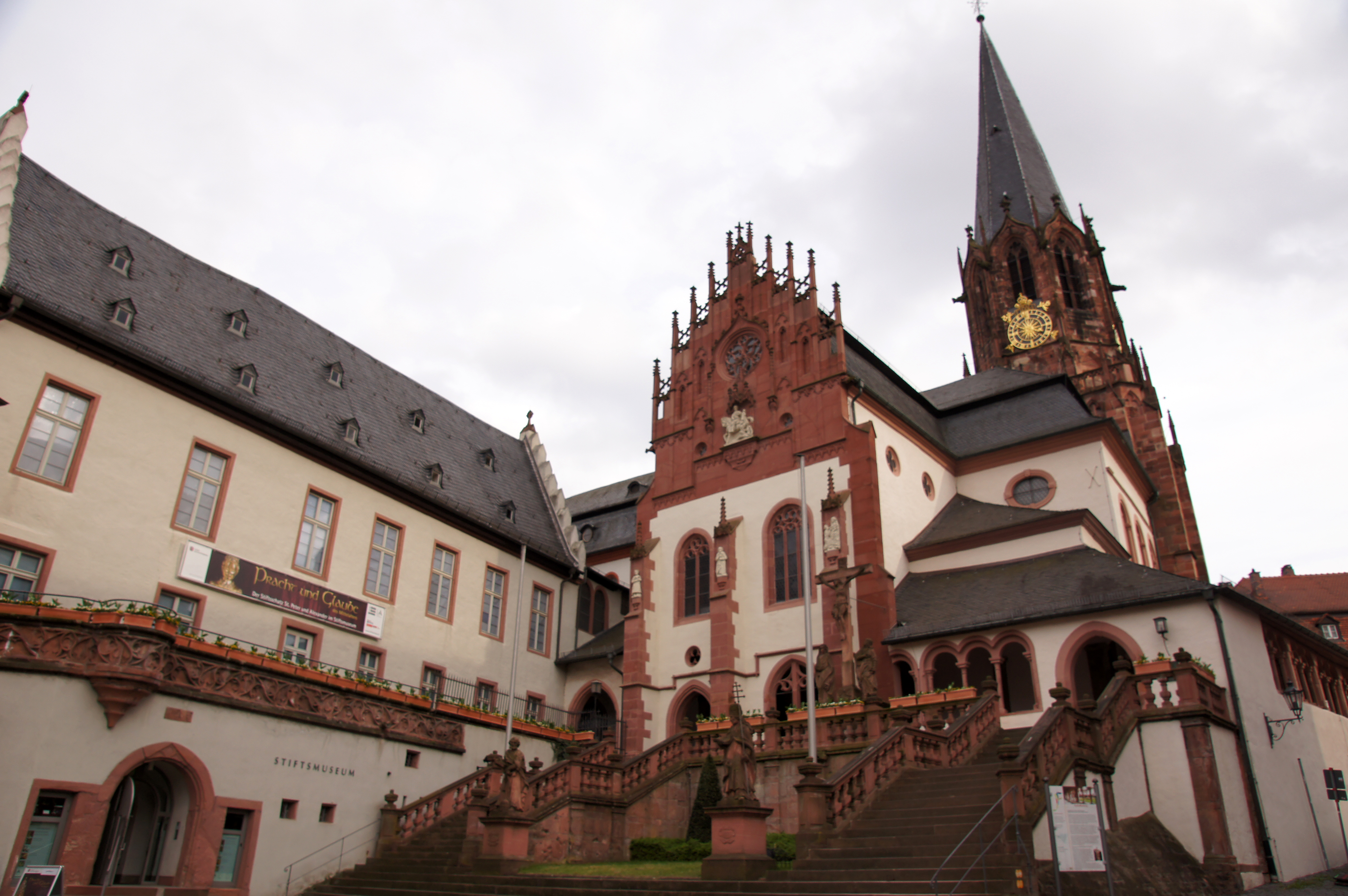 2011-03-26 Aschaffenburg 071 Stiftsplatz